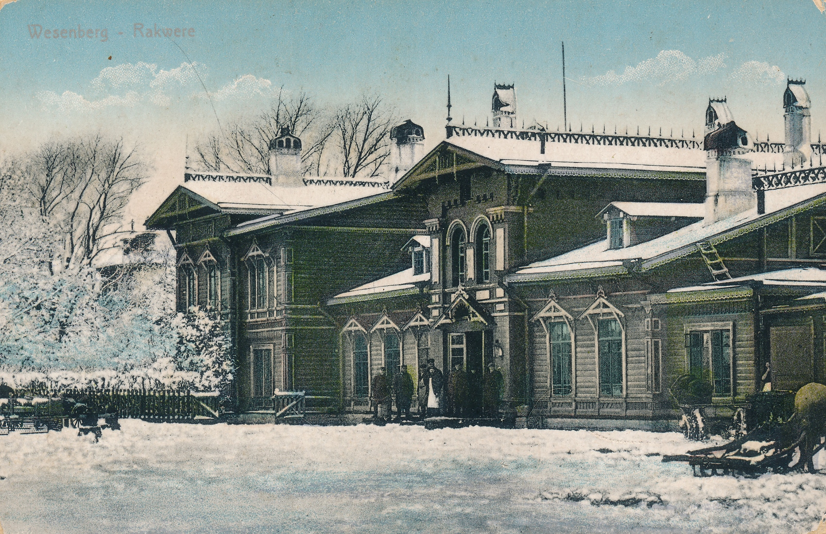 Rakvere esinduslik II klassi jaamahoone postkaardilt